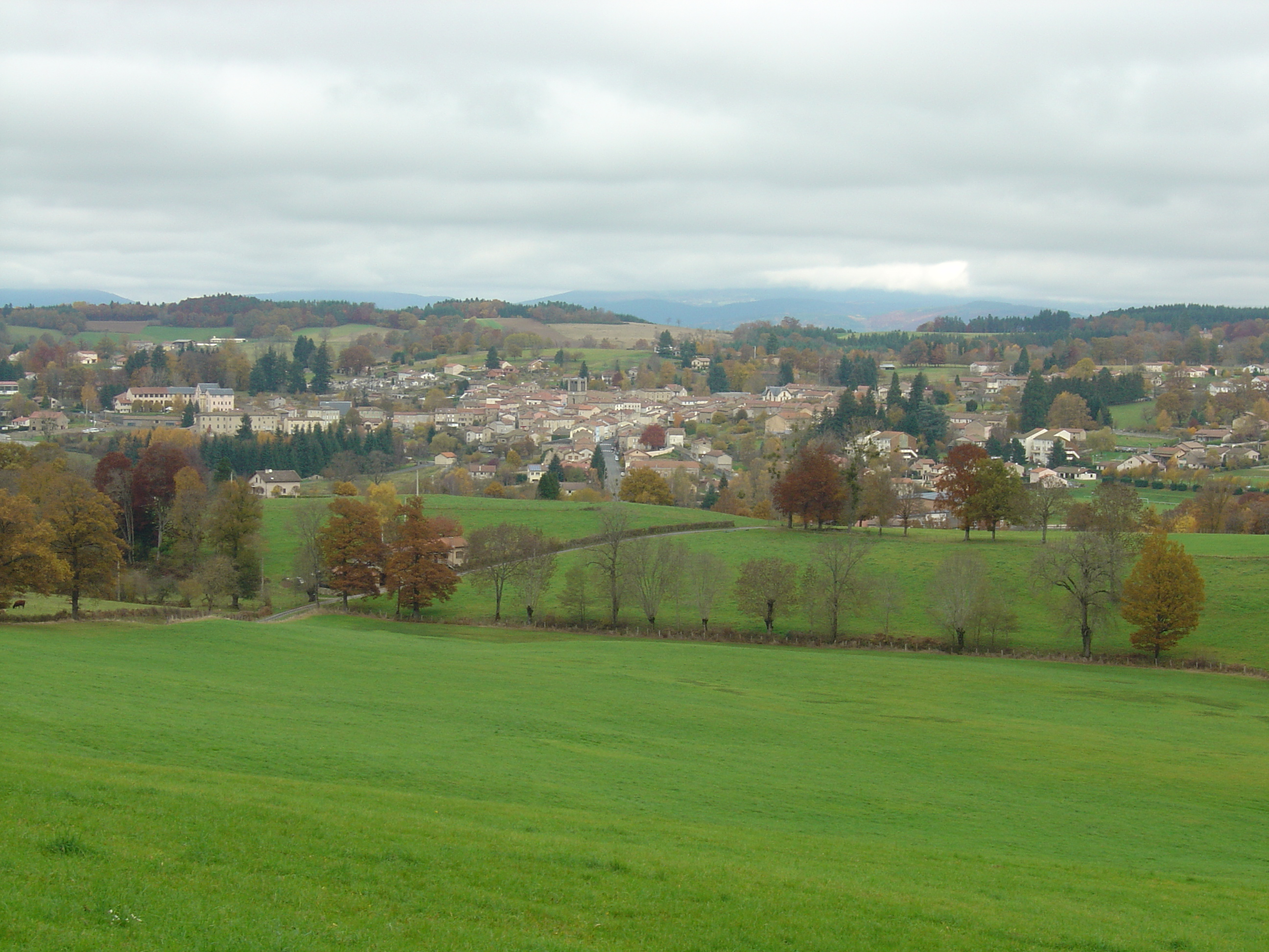 Vue générale de Cunlhat (63-Puy de Dôme; Livradois)